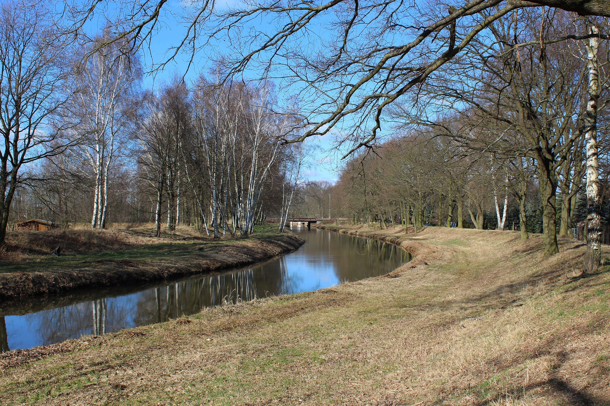 Die Pulsnitz kurz hinter der Einmündung des Elsterwerda-Grödel-Floßkanals in Elsterwerda. Im Hintergrund ist die Eisenbahnbrücke der Bahnstrecke Berlin–Dresden zu erkennen.